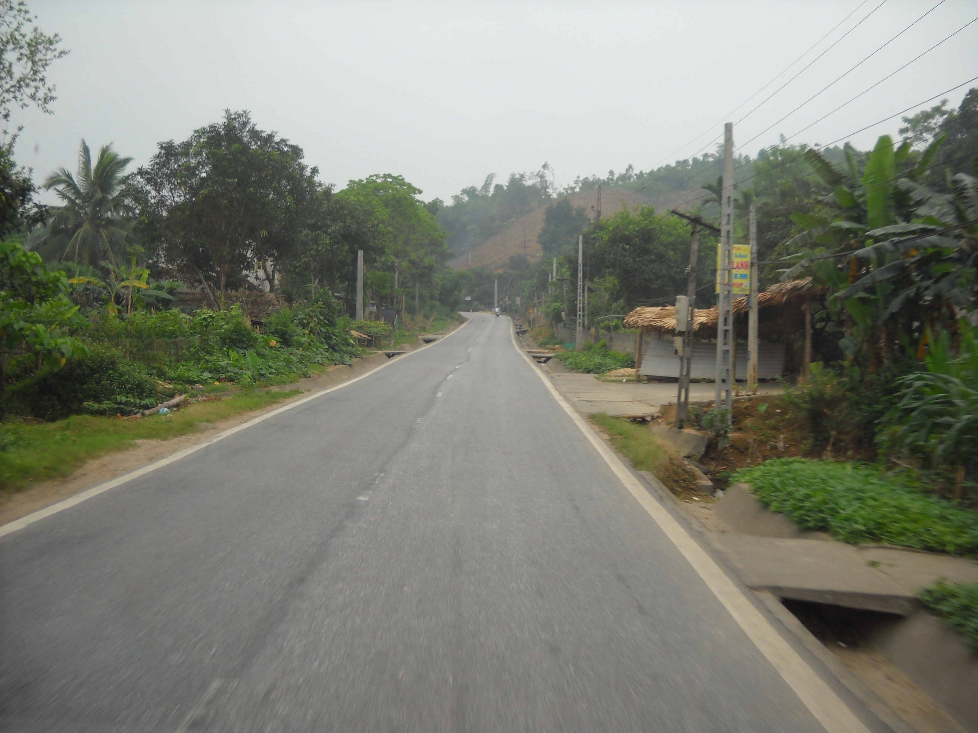 Quốc lộ 70, đoạn qua Yên Bình, Yên Bái